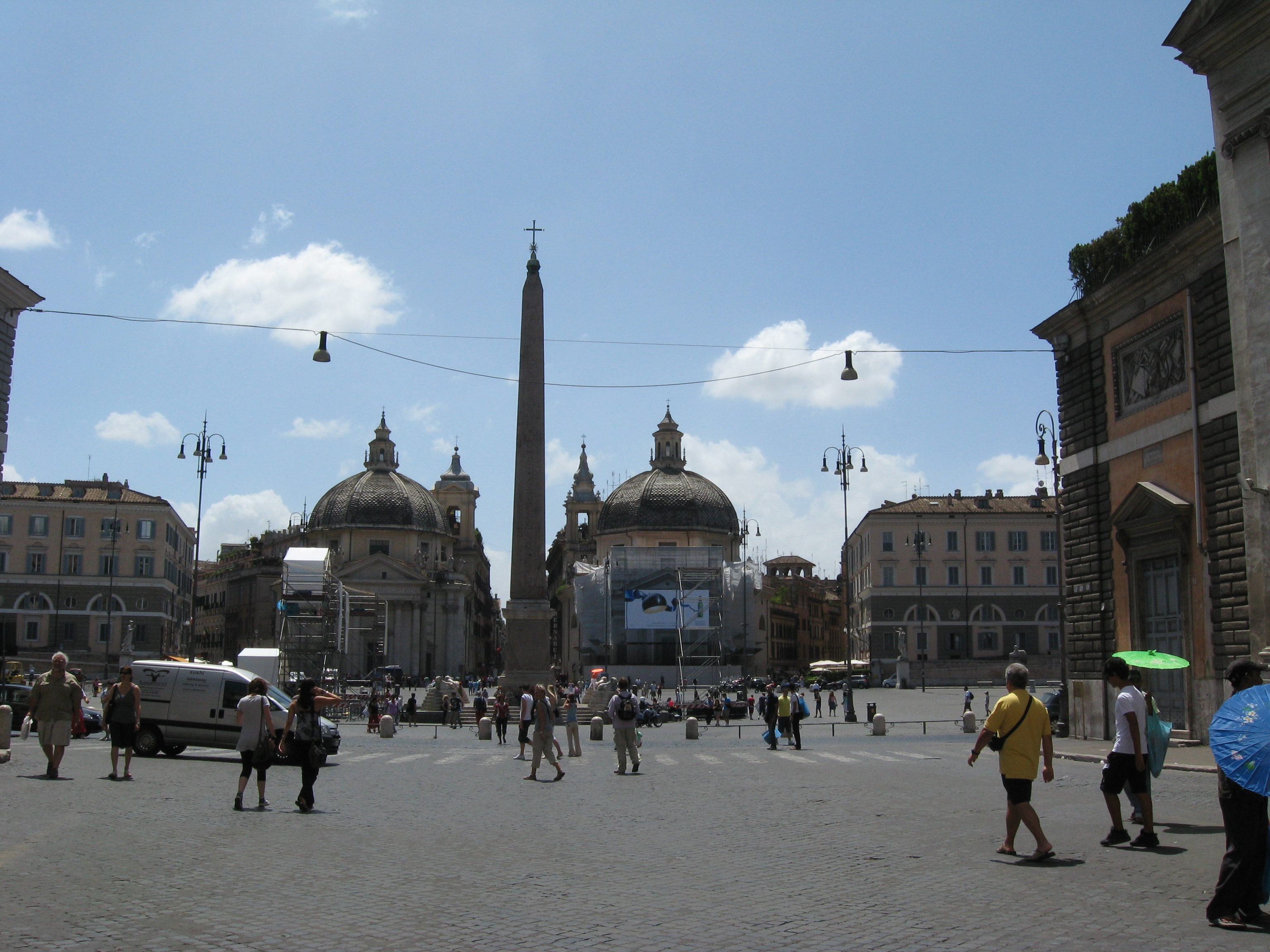 Pizza del Popolo